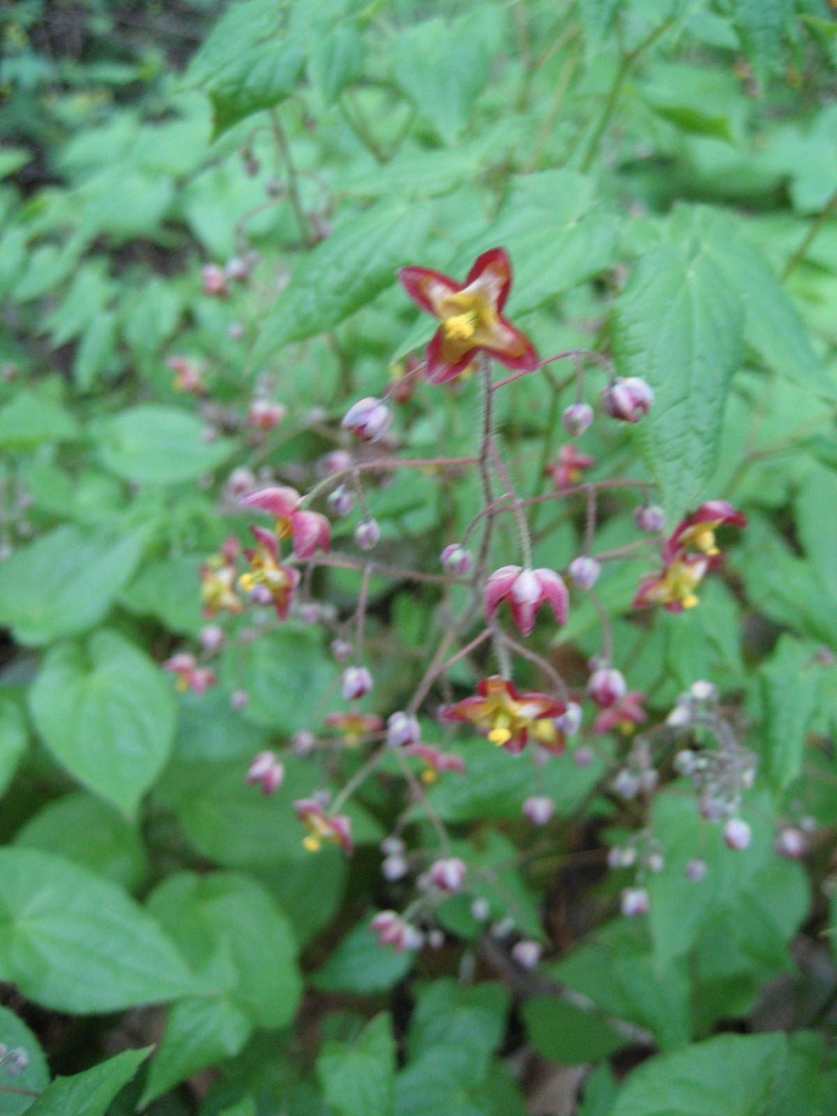 Epimedium alpinum - Blüte - Bot. Garten Berlin Dahlem